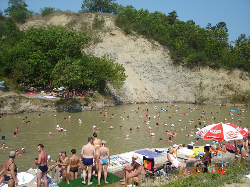 Kolozsi tó, Erdély